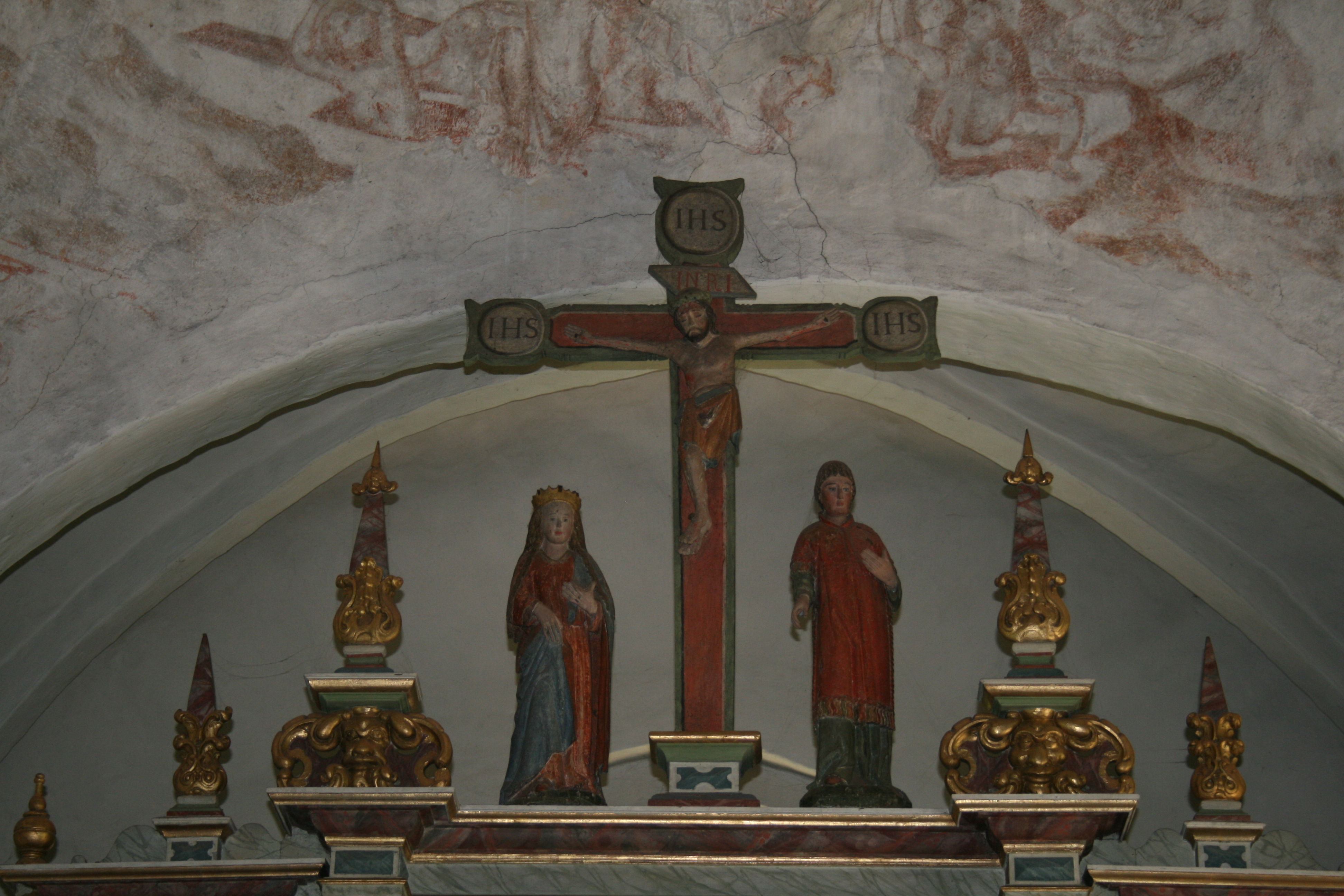 Kreuzigungsgruppe in der Laurentius-Kirche Kosel (Schleswig-Holstein) mit den Heiligen Katherina und Laurentius